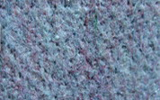 Tűzött nemez felületi képe